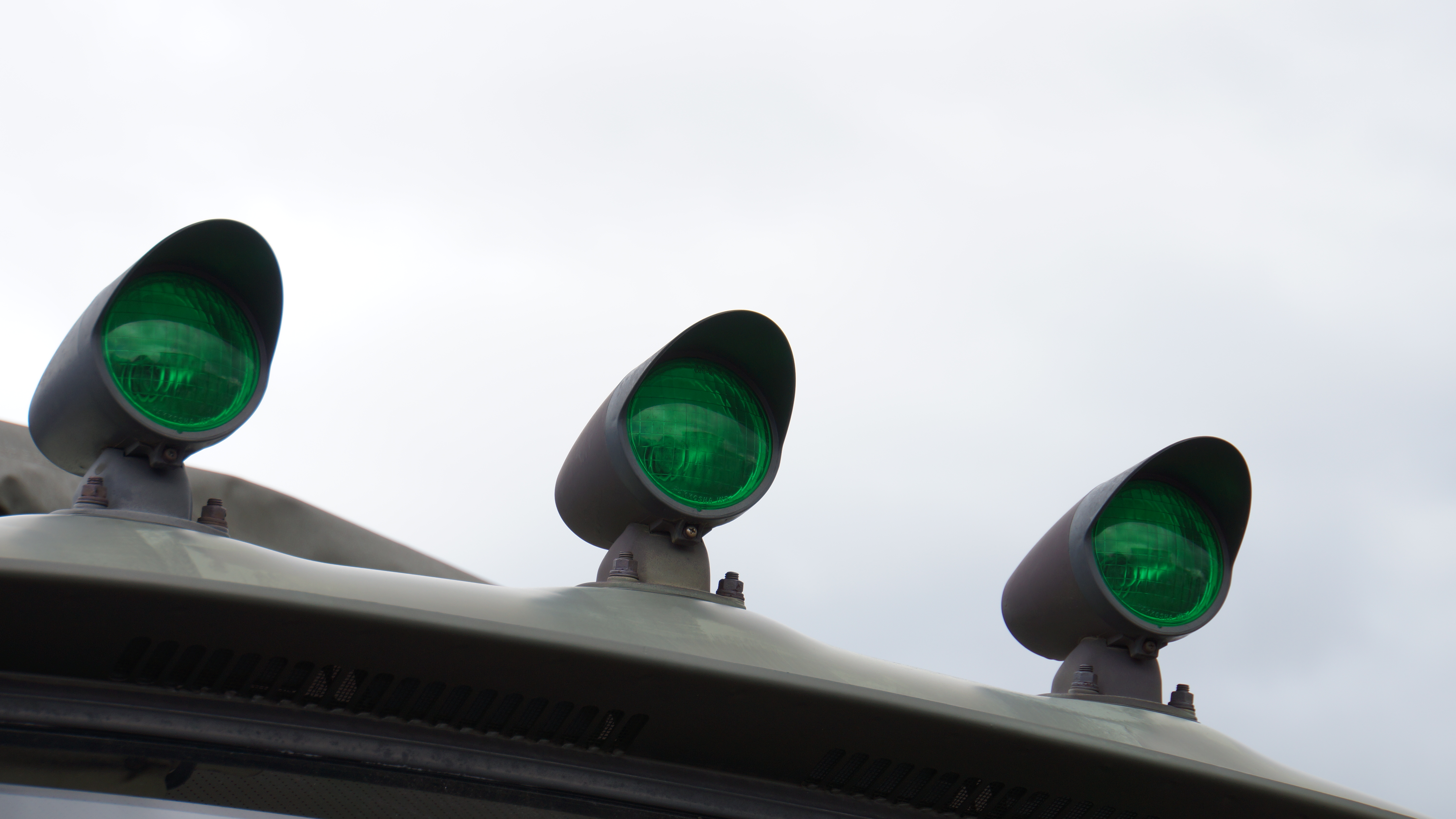 航空自衛隊 トラック2 1/2t 4×4カーゴ（いすゞ・HTS12G） 速度表示灯。15年6月6日 奈良基地にて。